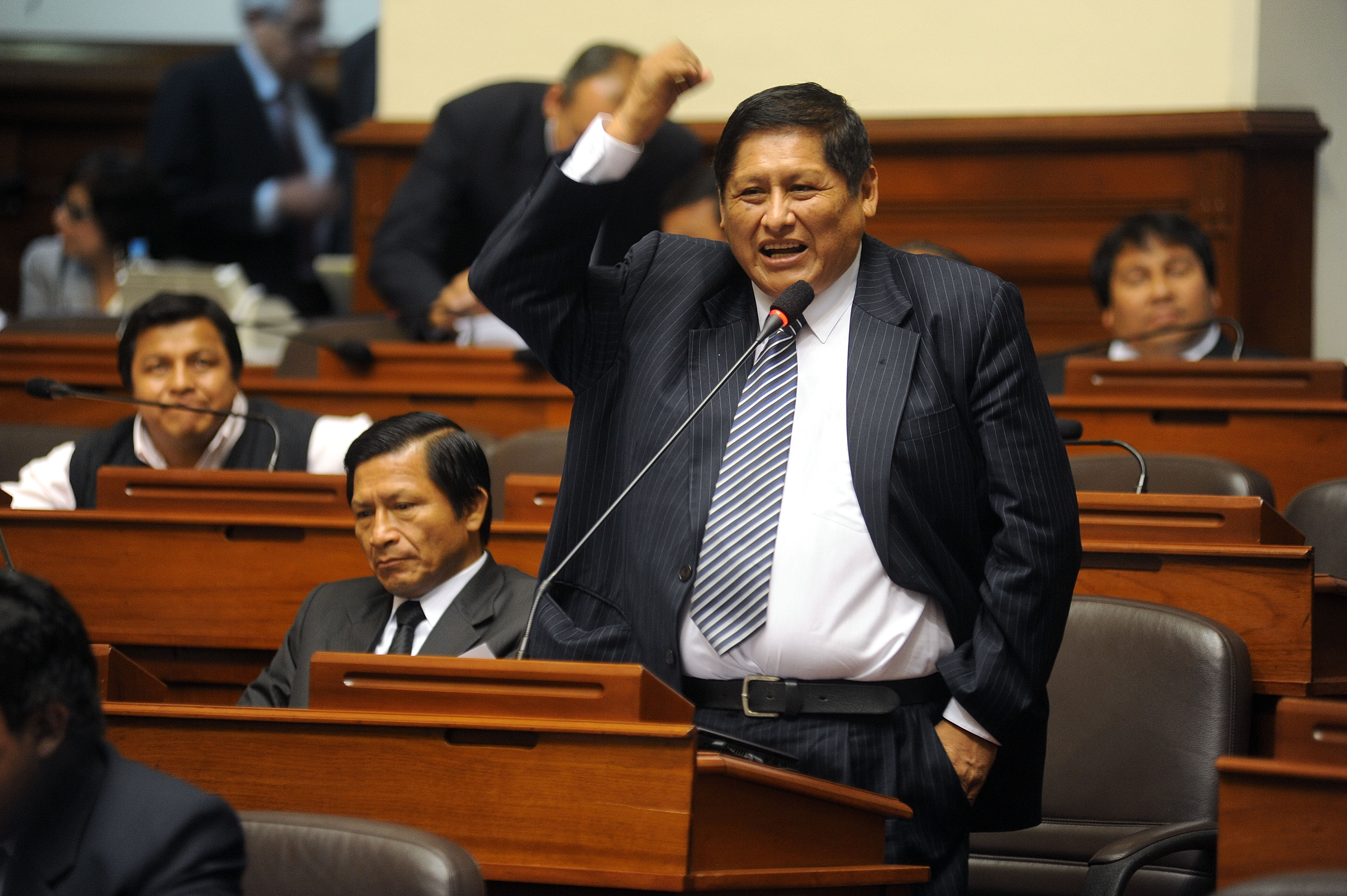 El parlamentario Juan Parí Choquecota, durante la sesión matutina efectuada por el Pleno, en el cual fijó su posición respecto a uno de los temas en debate.